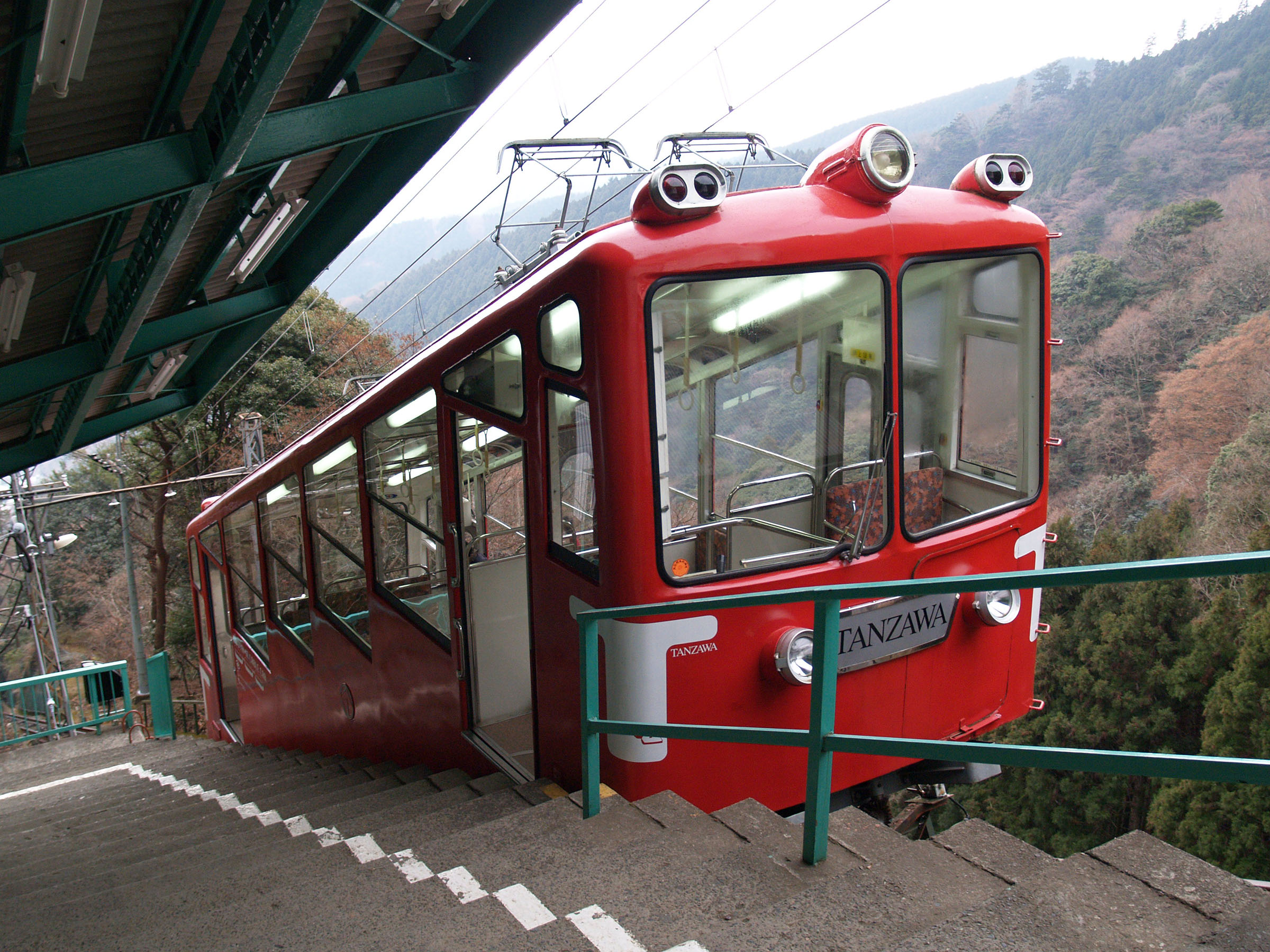 阿夫利神社駅に停車中の「たんざわ」号